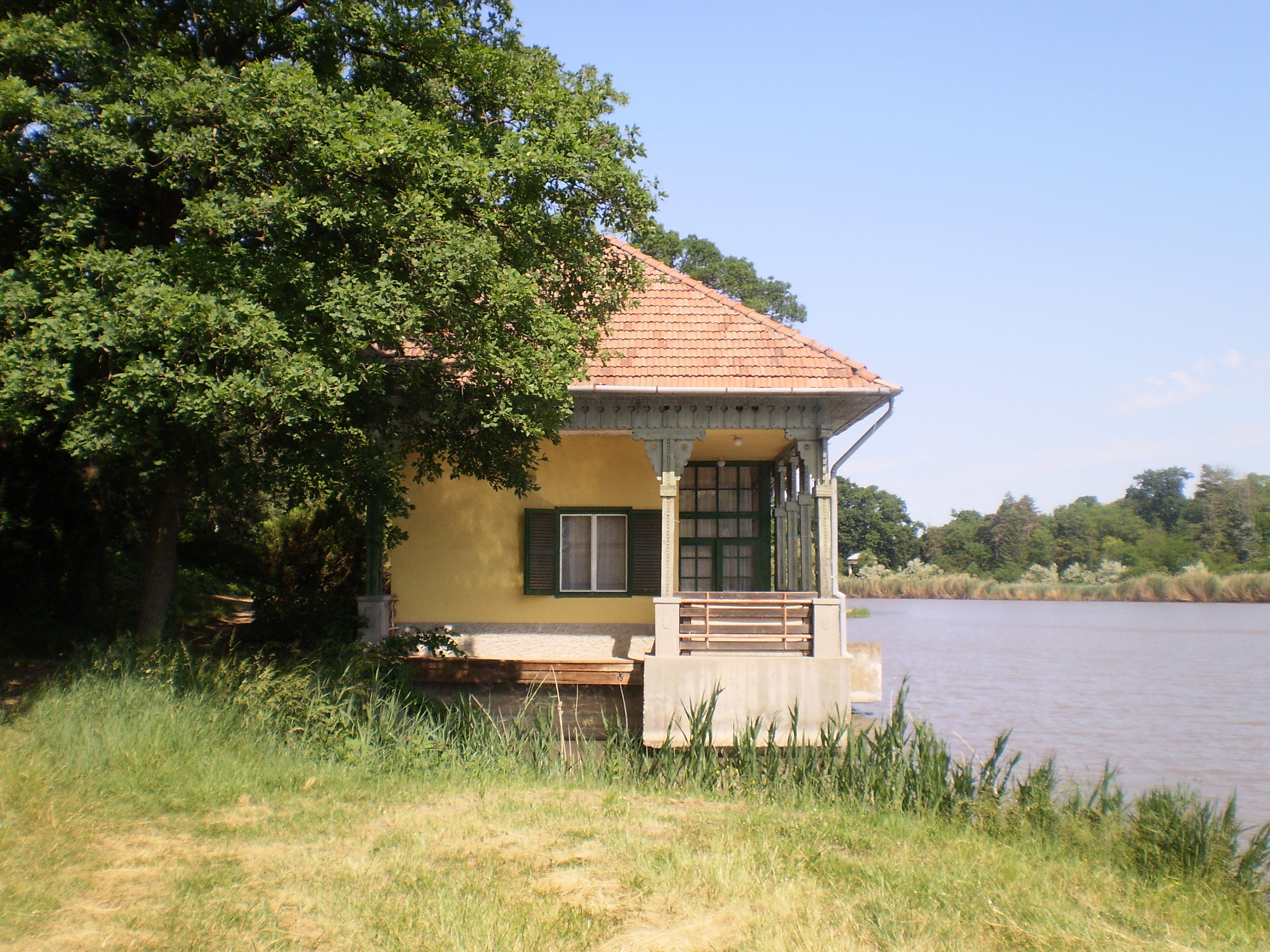 A nagymágocsi Károlyi-kastély halastavi csónakháza.